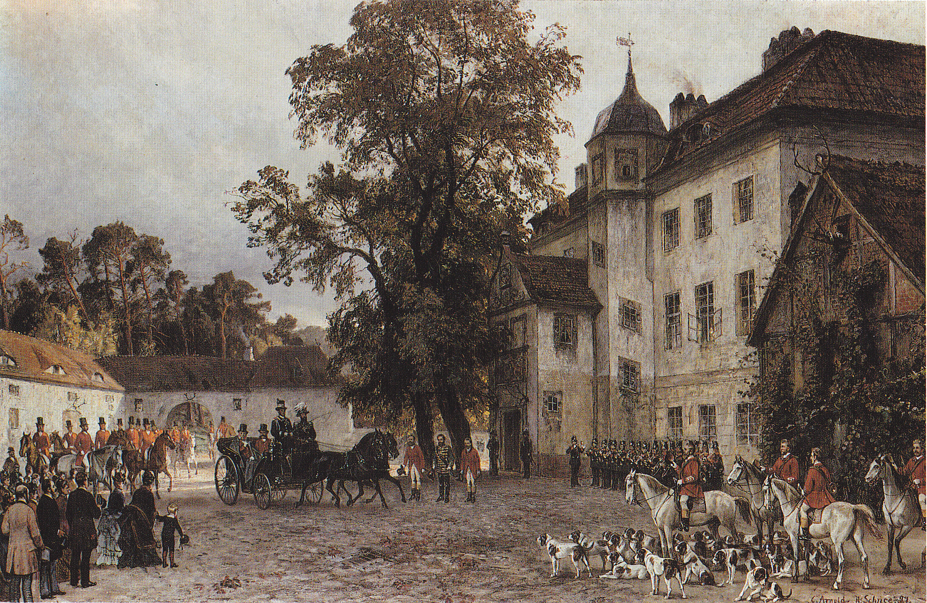 Das Ereignis fand vermutlich November 1886 statt. Das Bild spiegelt den Stilwandel vom Biedermeier zur wilhelminischen Epoche. Die Pinselführung steht im Widerspruch zur Detailschärfe ohne Porträtähnlichkeit. Nach dem einfallenden Licht, das nur noch den südwestlichen Hofteil beleuchtet, findet dasEreignis am späten Nachmittag statt. Der 89-jährige Kaiser sitzt im offenen Jagdwagen. Vor den beiden Kastanien begrüßt ihn der Jagdzeugmeister. Rechts vorne stehen die Piqueure mit Graf Salomon an der Spitze und der Meute. Zur Begrüßung des Kaisers bläst ein Musikcorps. Hermann Schnee hat das Schloss rechts mit drei anstatt zwei Fenstern gemalt. Die Kastanien sind entgegen der Jahreszeit belaubt. Die Zinkgußgruppe Wildschweinjagd von Wilhelm Wolff (1861) in der Mitte des Hofes ist weggelassen.